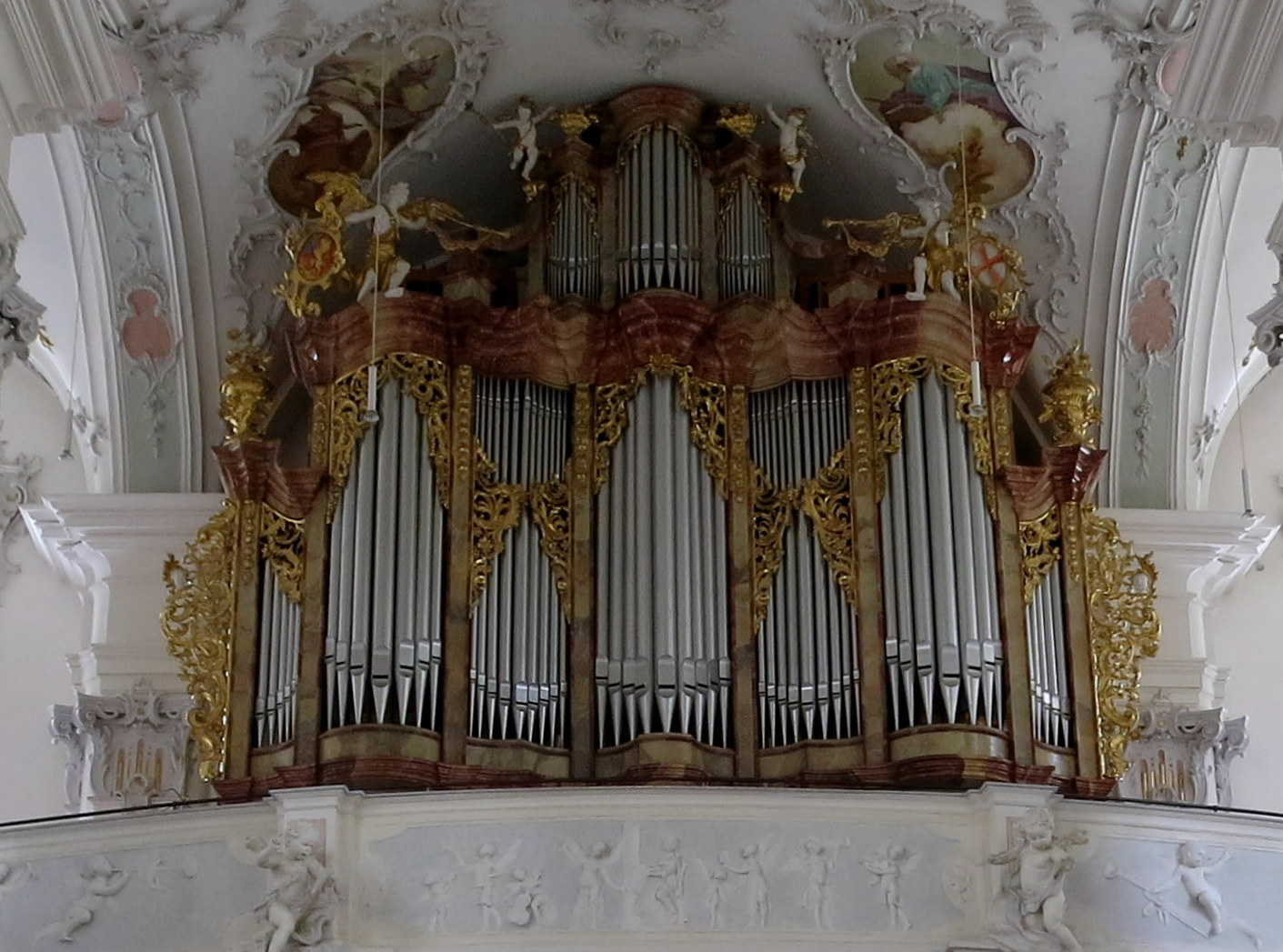 Blick zur Orgelempore; Orgelprospekt von 1745 von Johann Michael Bihler, Orgelwerk von 1976 von Johannes Karl (Aichstetten)